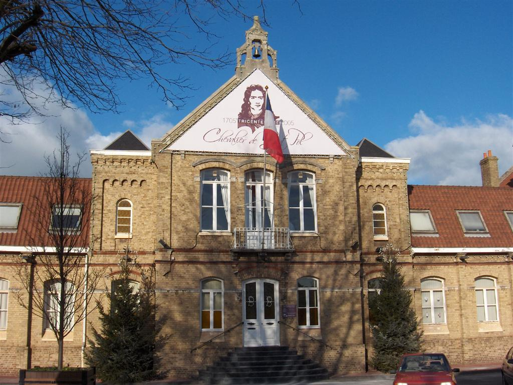 Mairie de Saint-Pol-sur-Mer Photo prise le 27/12/05